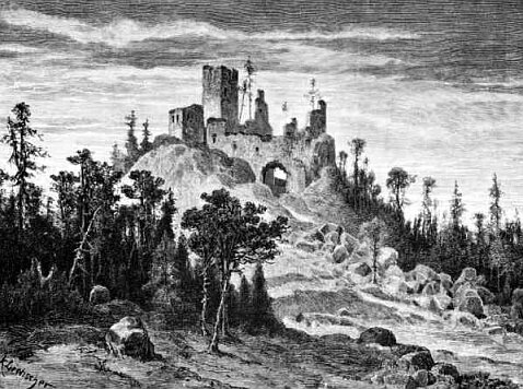 Česky: Choustník